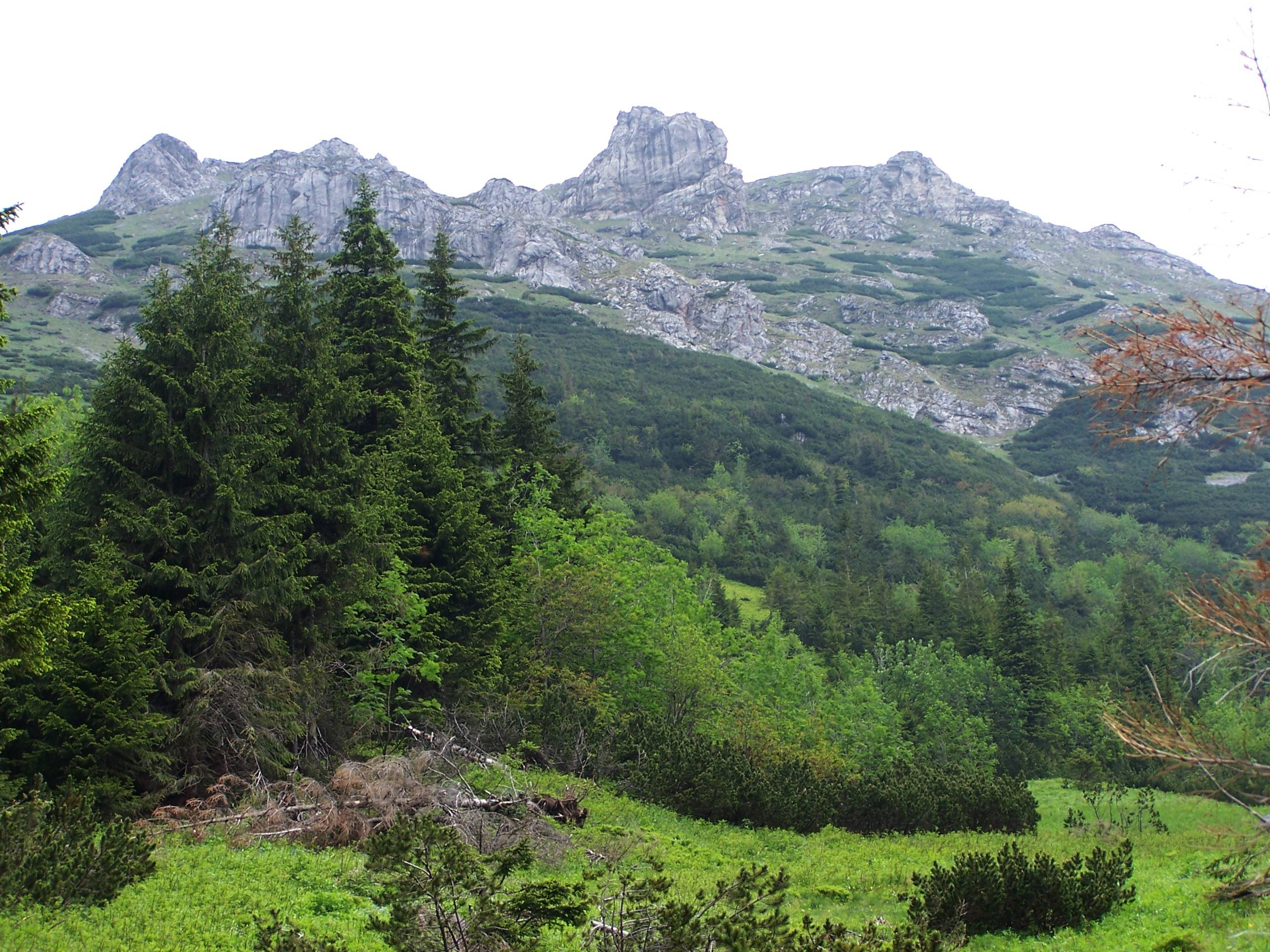 Dolina Tomanowa - wapienne turnie. tzw. Rzędy (West Tatra Mountains